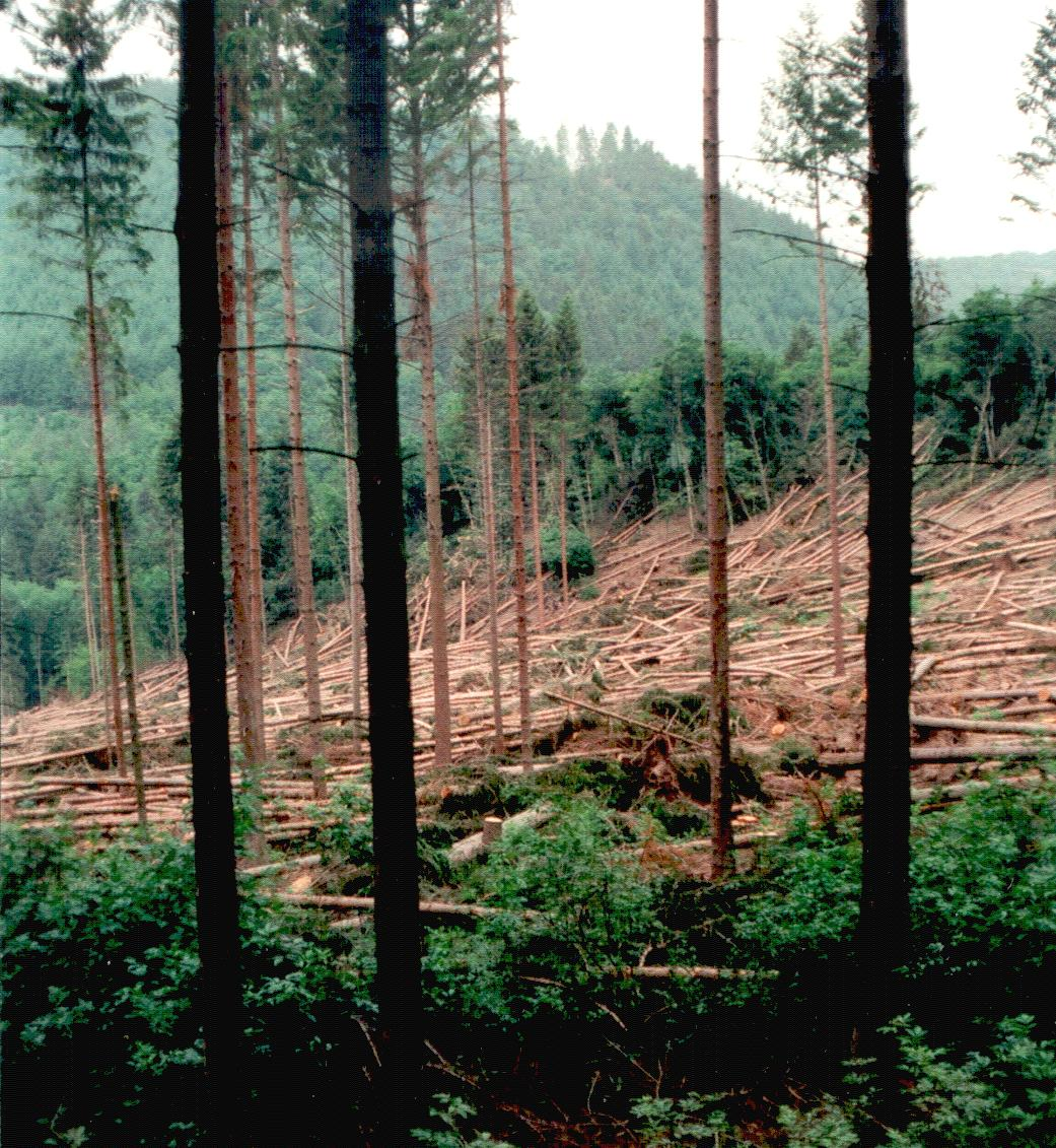 Vom Orkan Wiebke geworfener Nadelholzbestand aus Fichte und Douglasie bei Plein (Landkreis Wittlich).